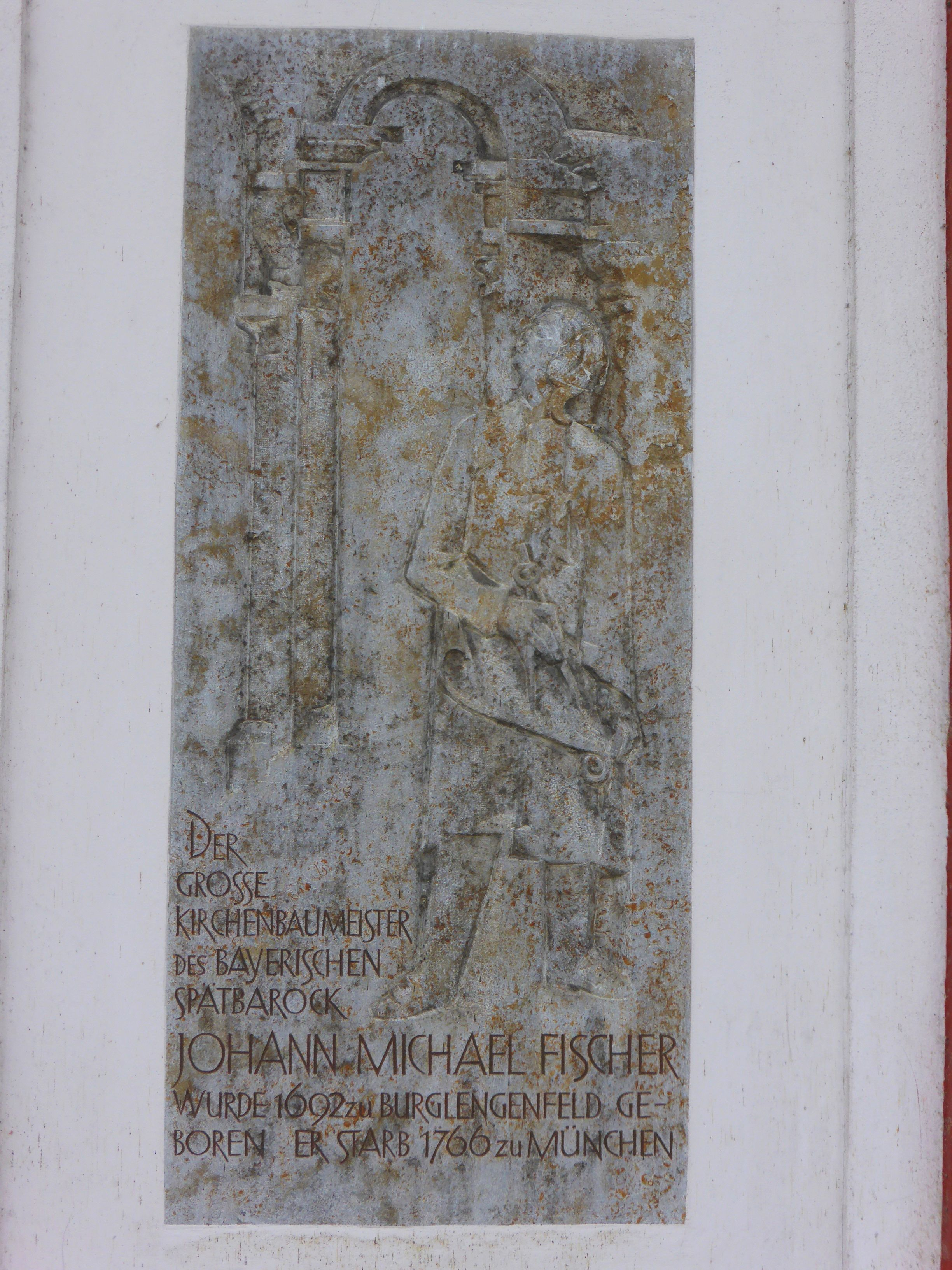 Gedenktafel für Johann Michael Fischer am Rathaus von Burglengenfeld